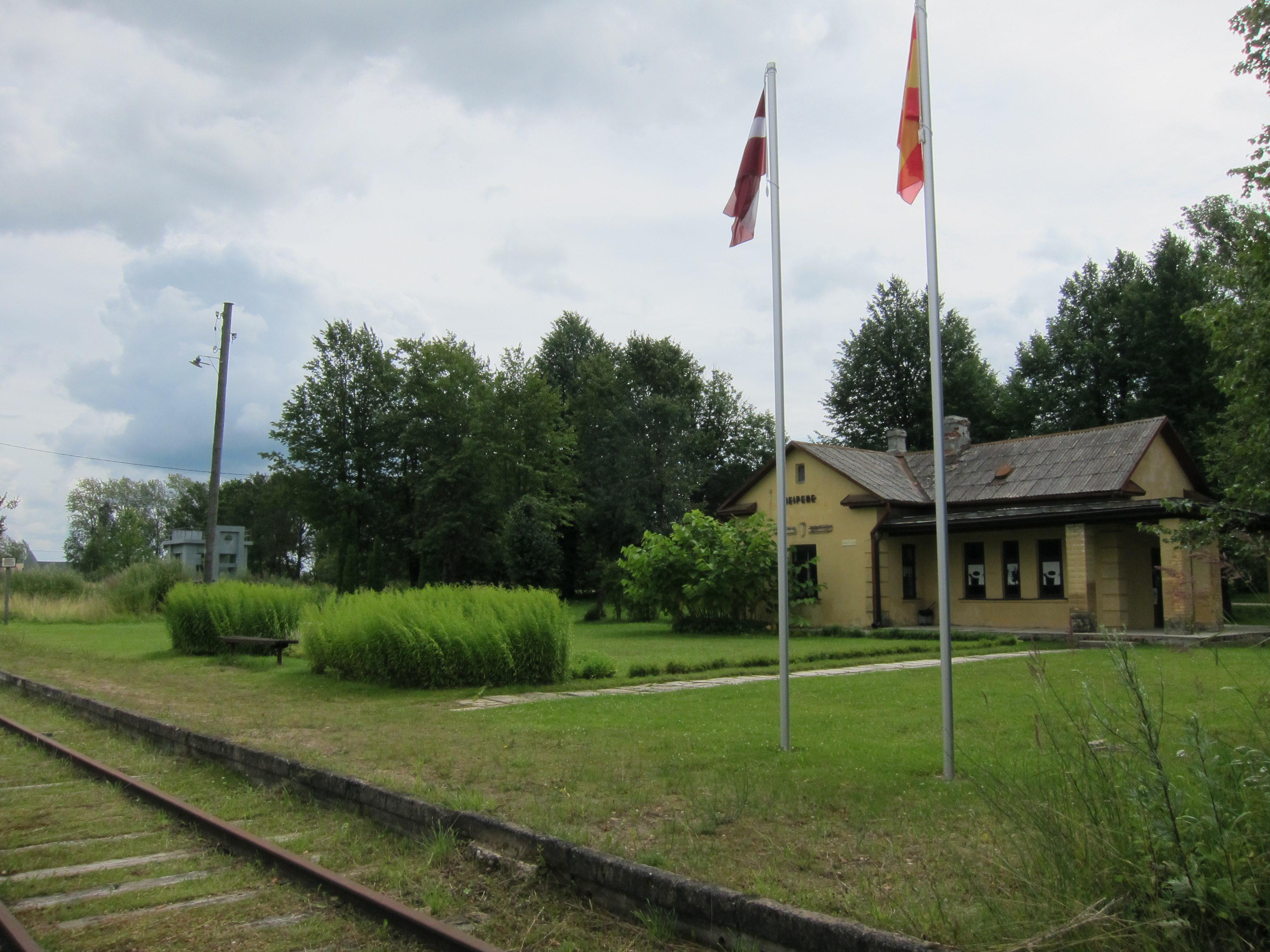 Ķeipenes stacija